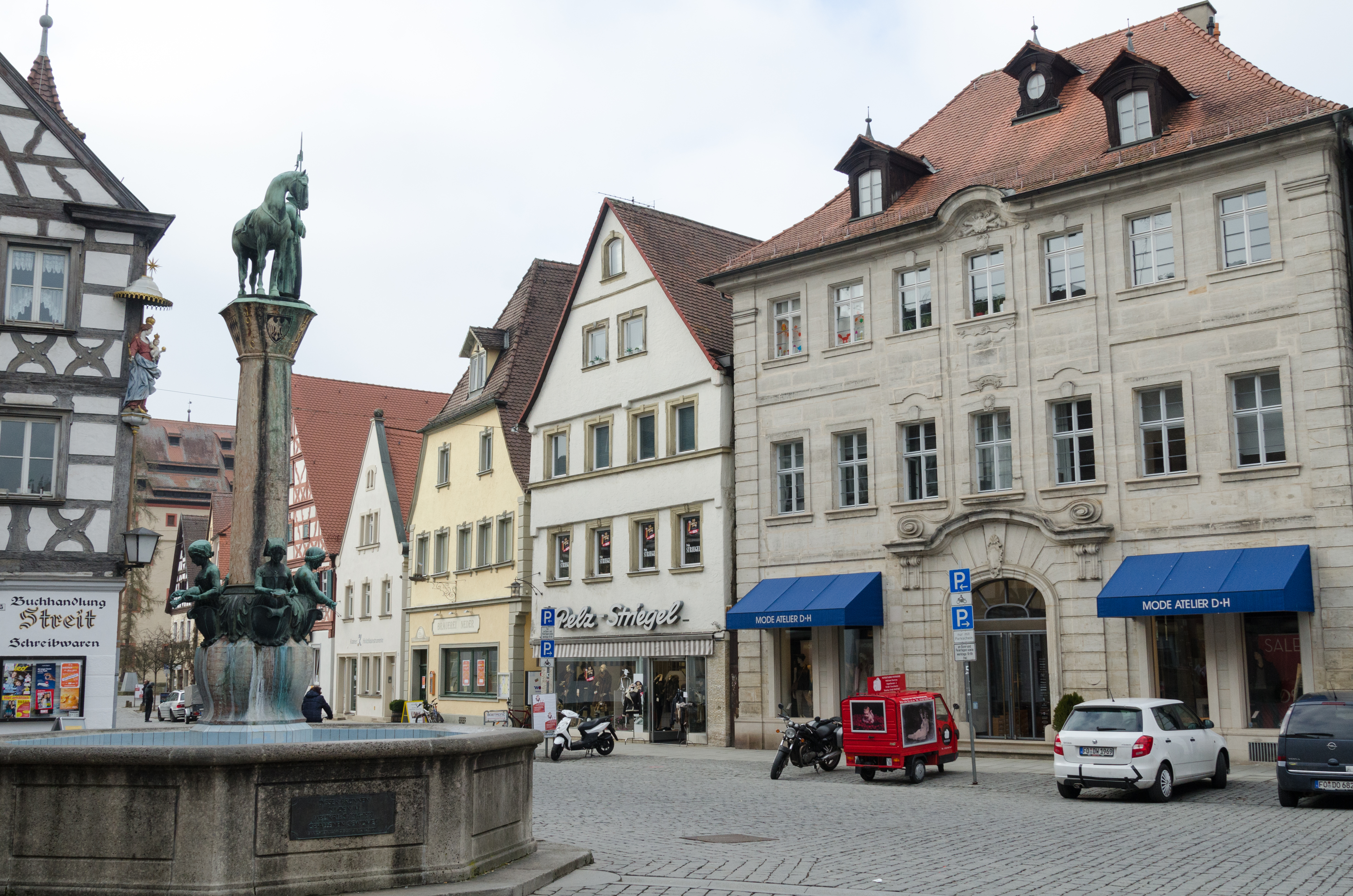 Forchheim, Hauptstraße 17